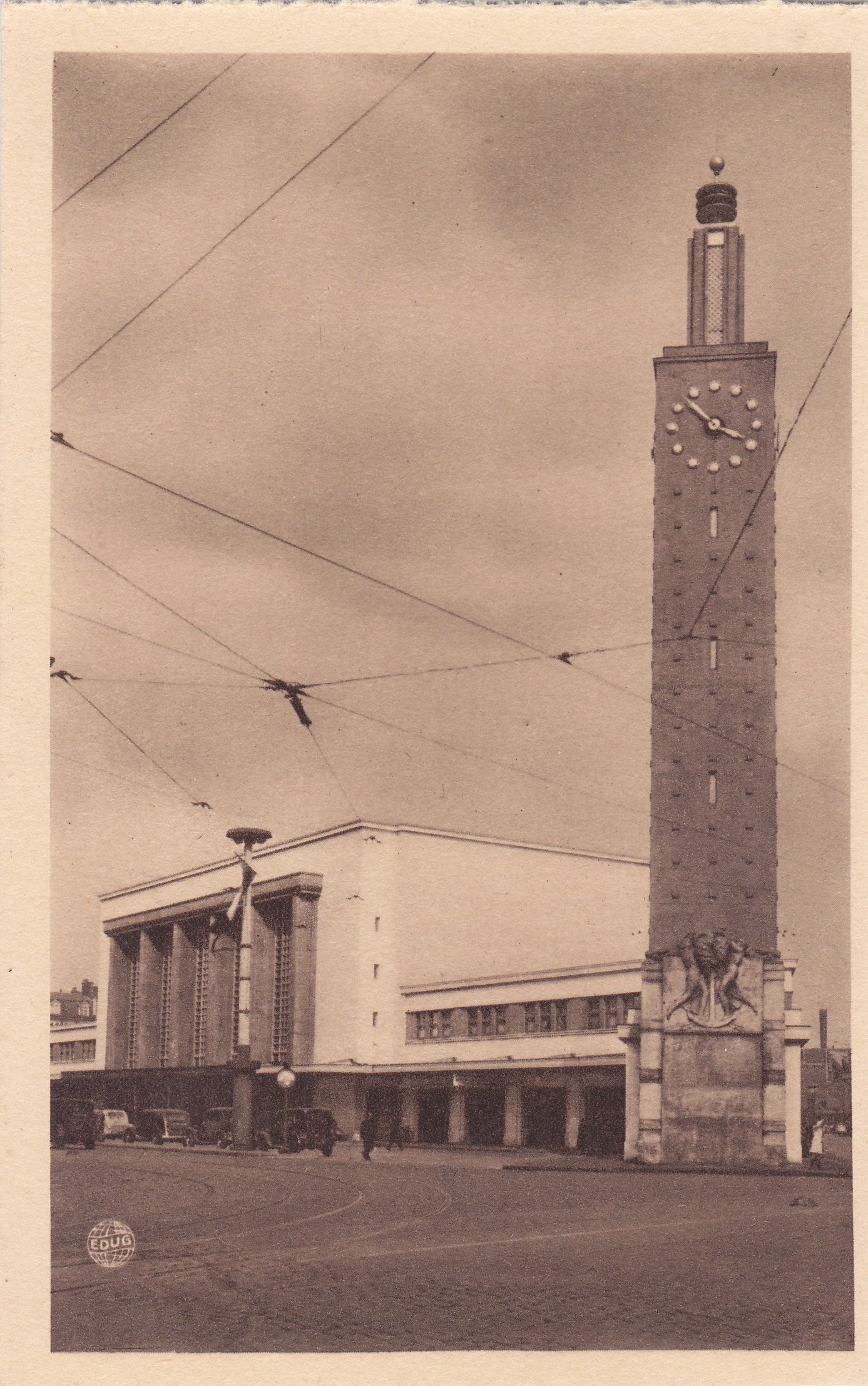 Le Havre, França, La Gare, princípio do séc. XX, França, Arquivo de Villa Maria, Angra do Heroísmo, Açores.